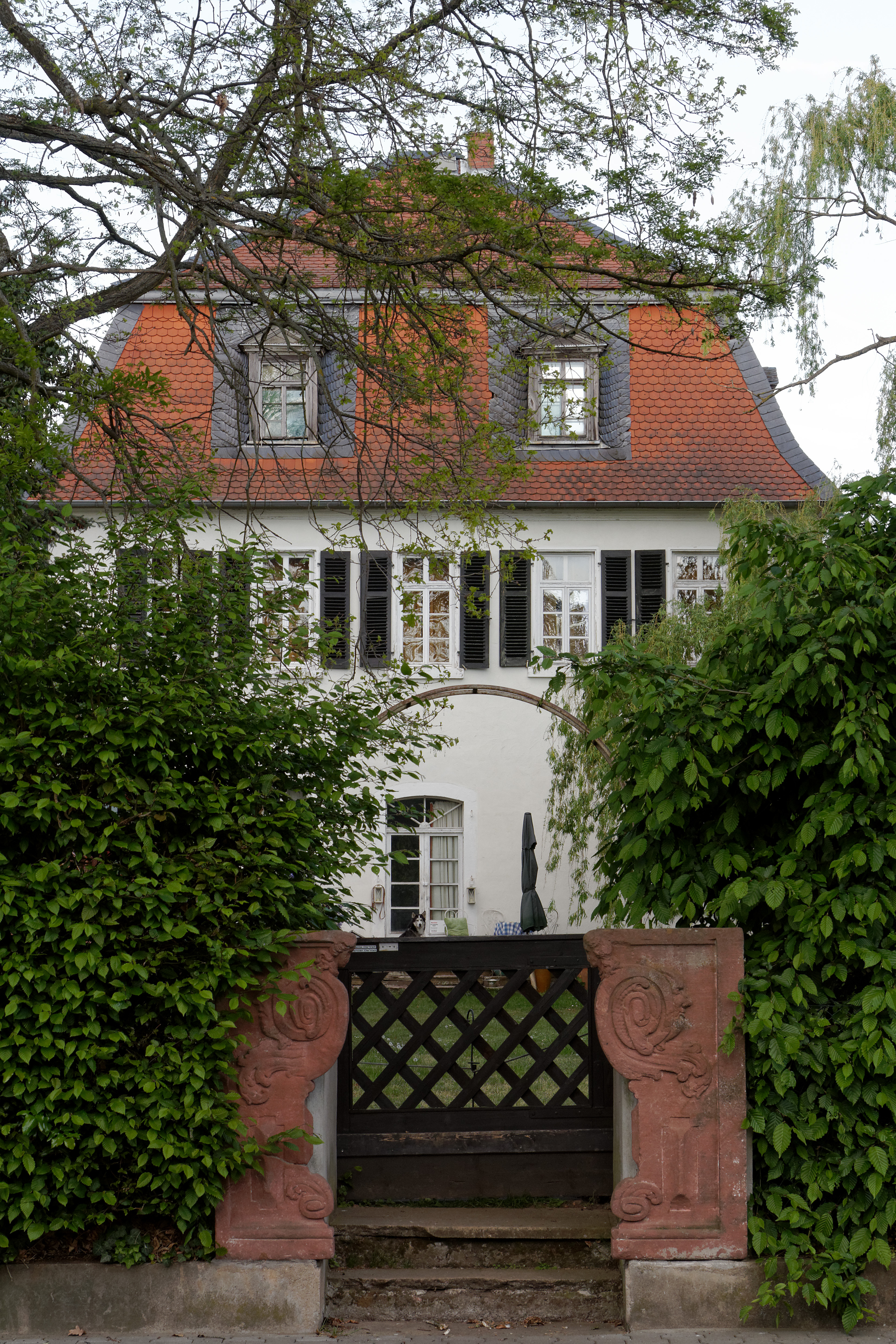 Altes Jagdschlösschen in Harreshausen, einem Stadtteil von Babenhausen (Hessen), erbaut 1723.